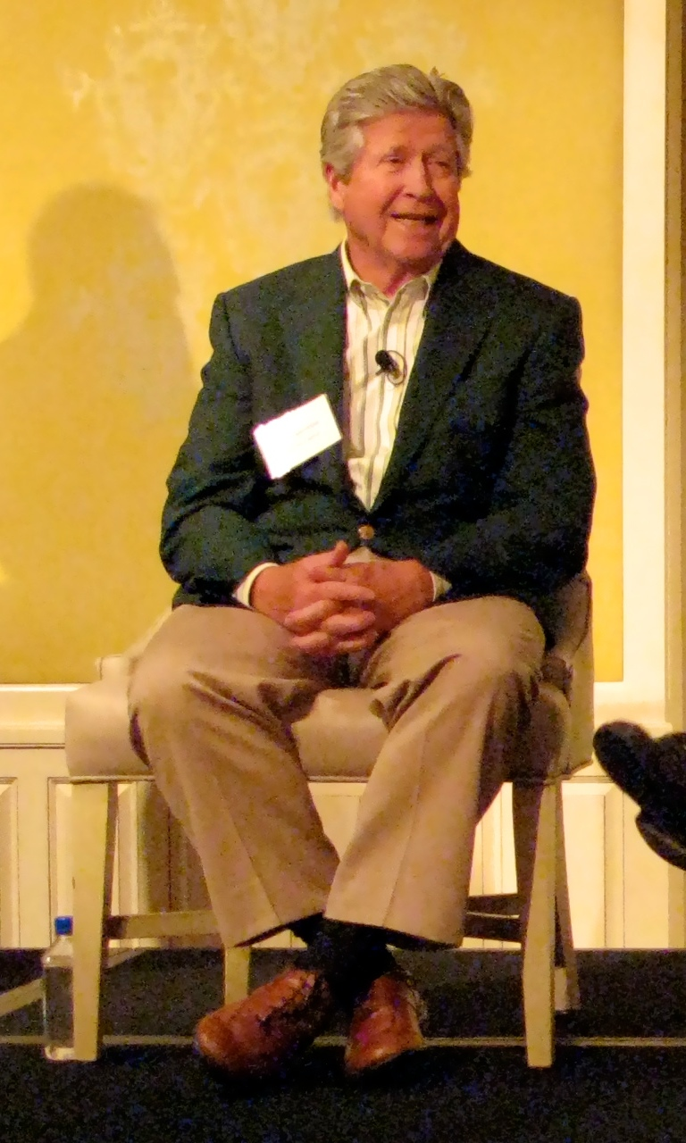 Don Valentine